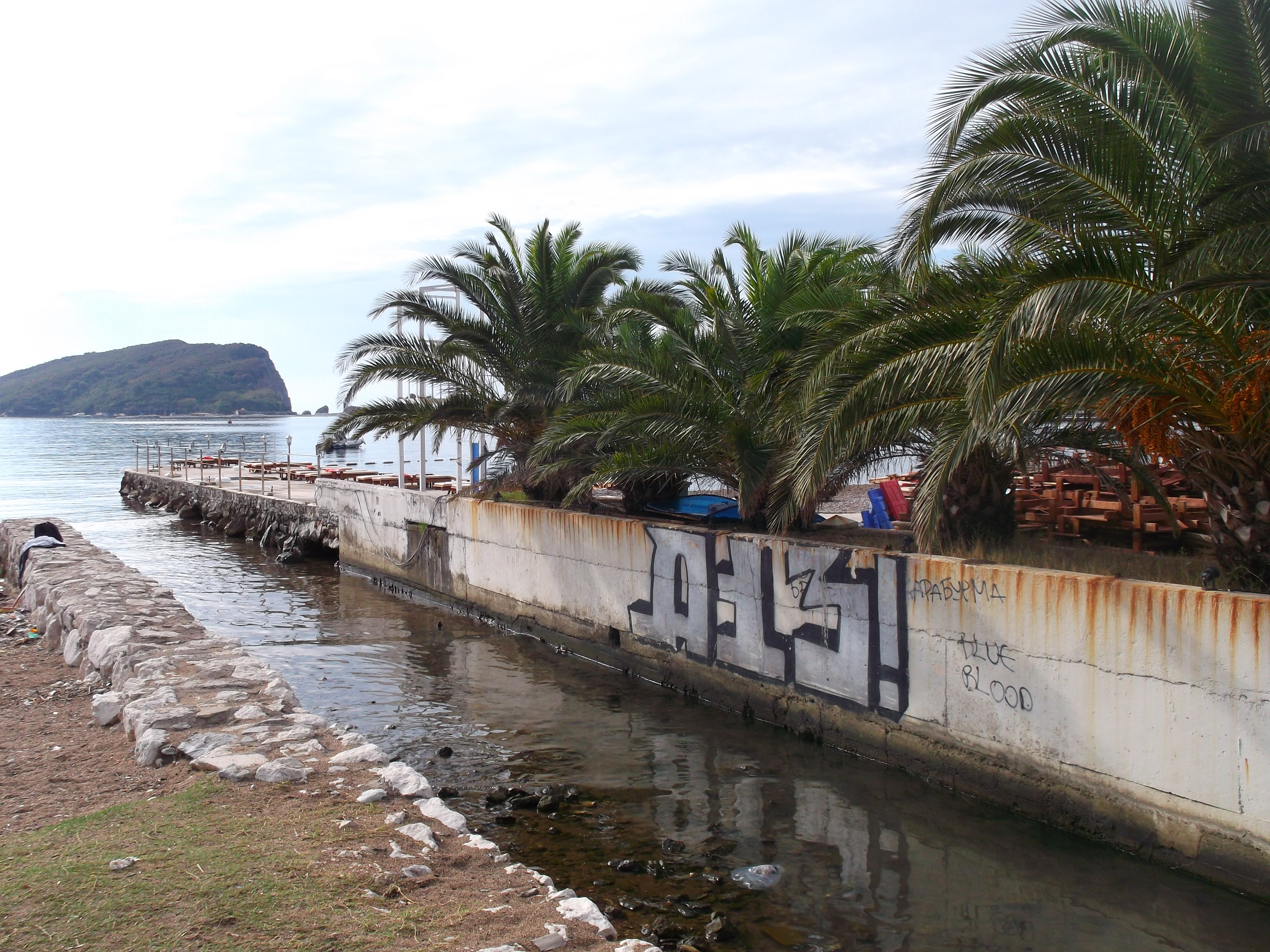 Slovenska Obala, Budva, Montenegro